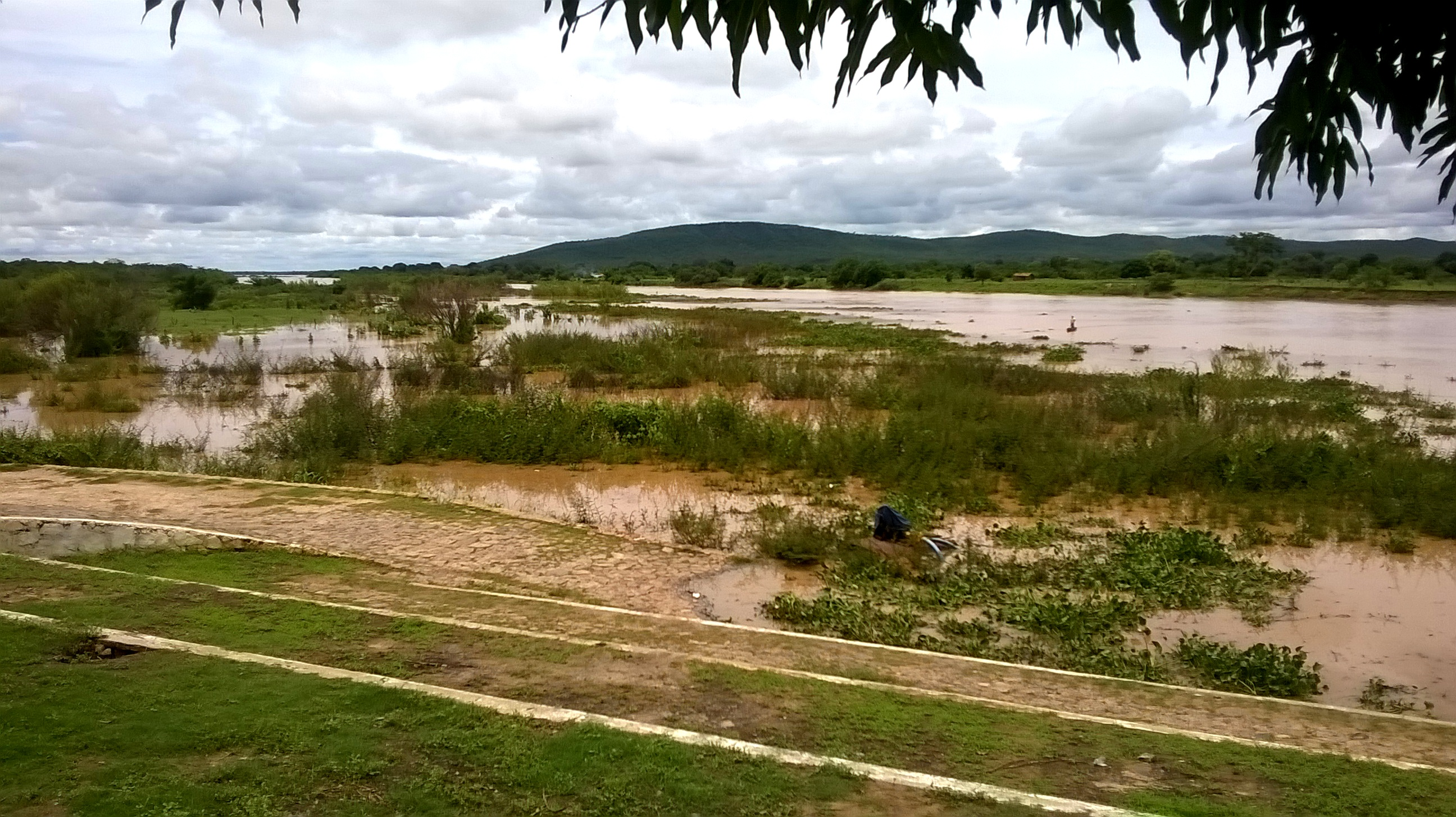 Porto de Paratinga - BA, durante cheia do Rio São Francisco, em janeiro de 2016.